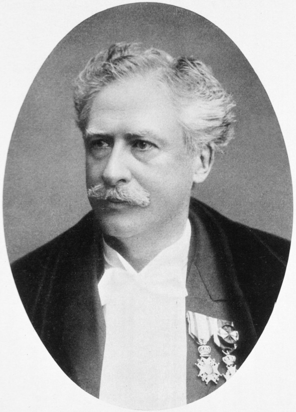 Hermann Snellen, Oftalmologo tedesco it:19 Febbraio, it:1834 Zeist (Utrecht)-it:18 Gennaio, it:1908